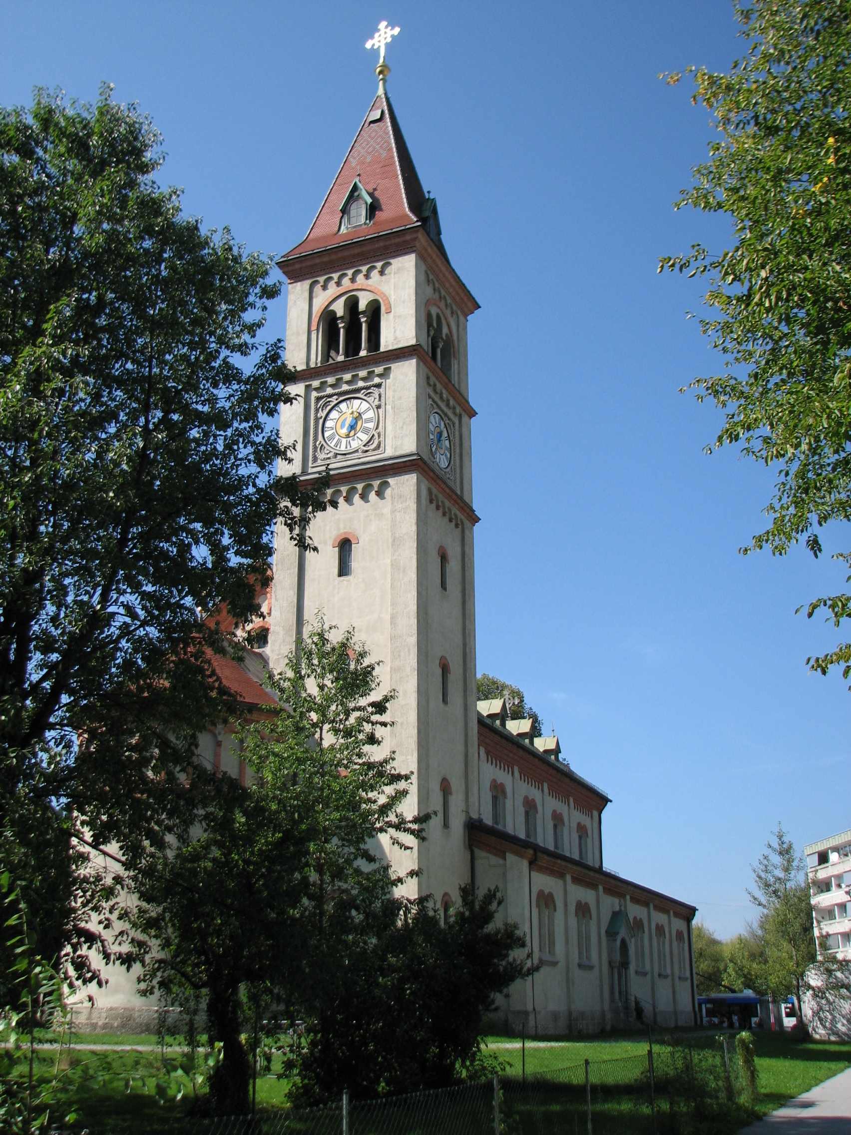 Kath. Pfarrkirche Itzling, hl. Antonius von Padua Turm, Ansicht von Osten